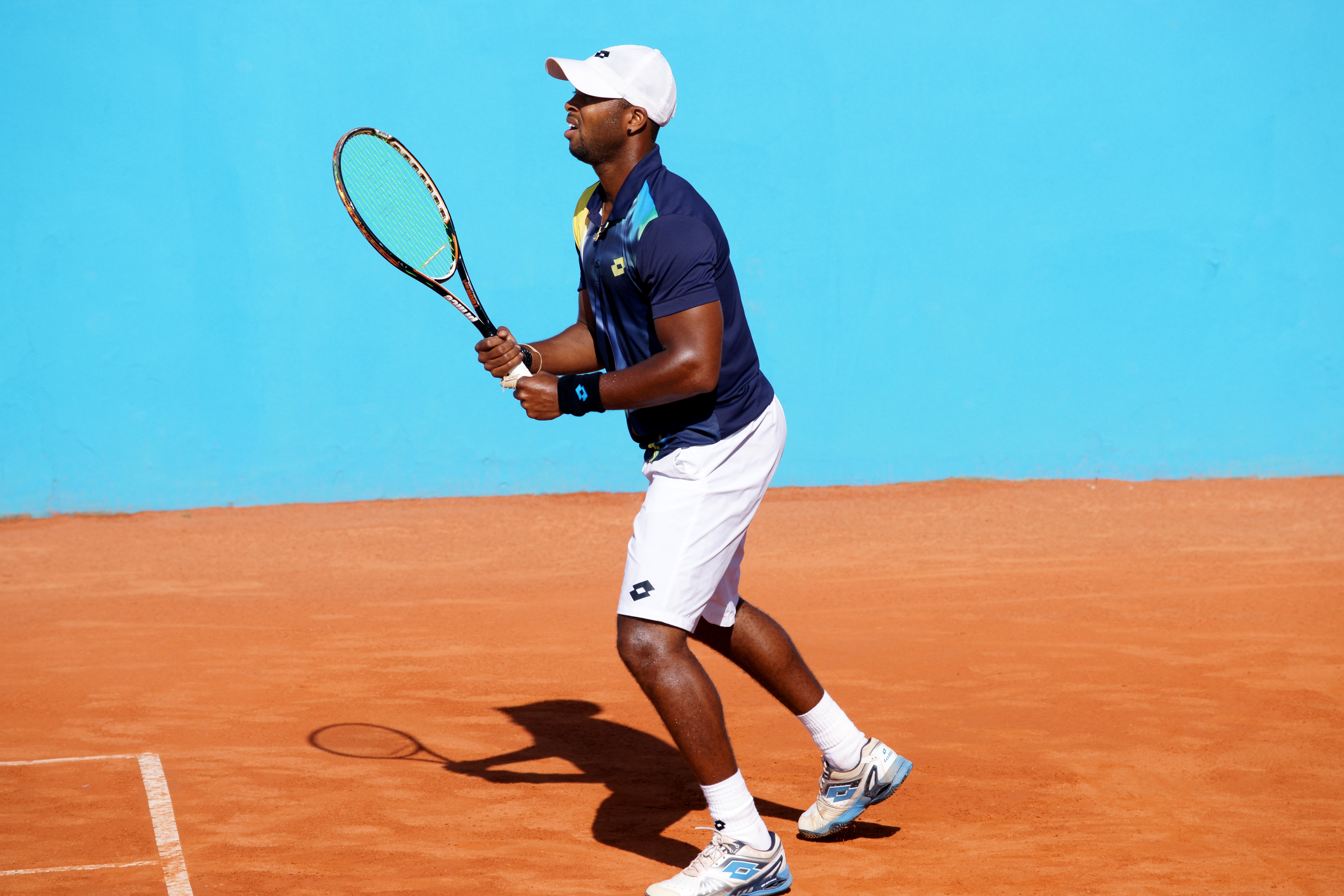 Donald Young Nice Open ATP 2014.jpg